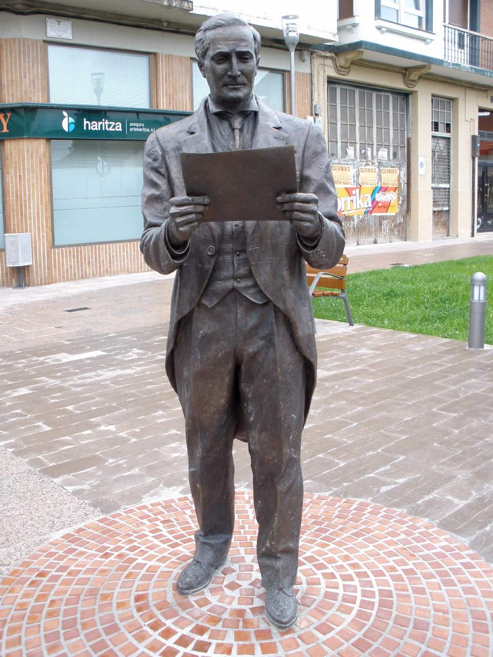 Guernica - Monumento al lehendakari Aguirre